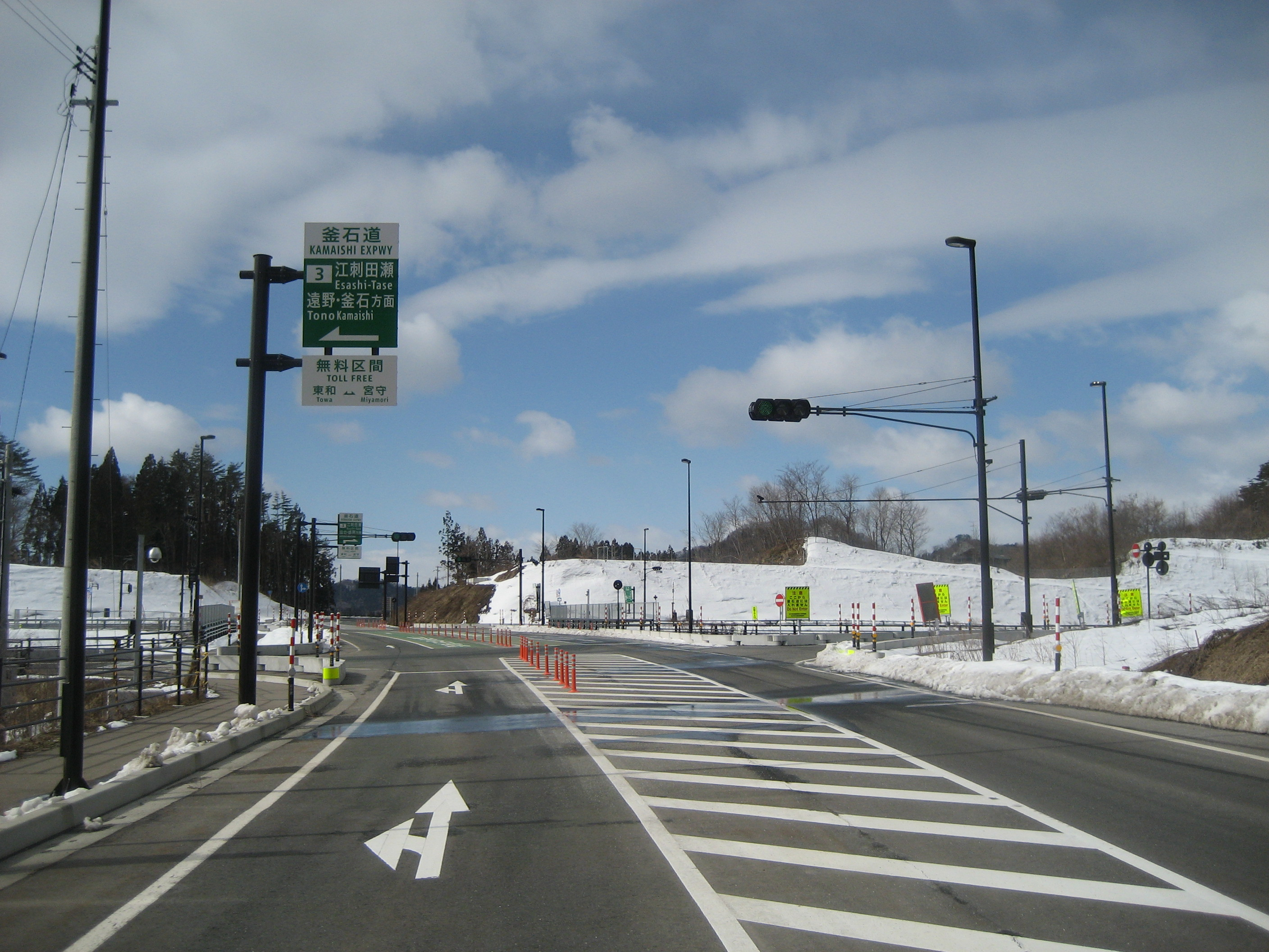 釜石自動車道江差田瀬IC（国道107号線との交差点付近）